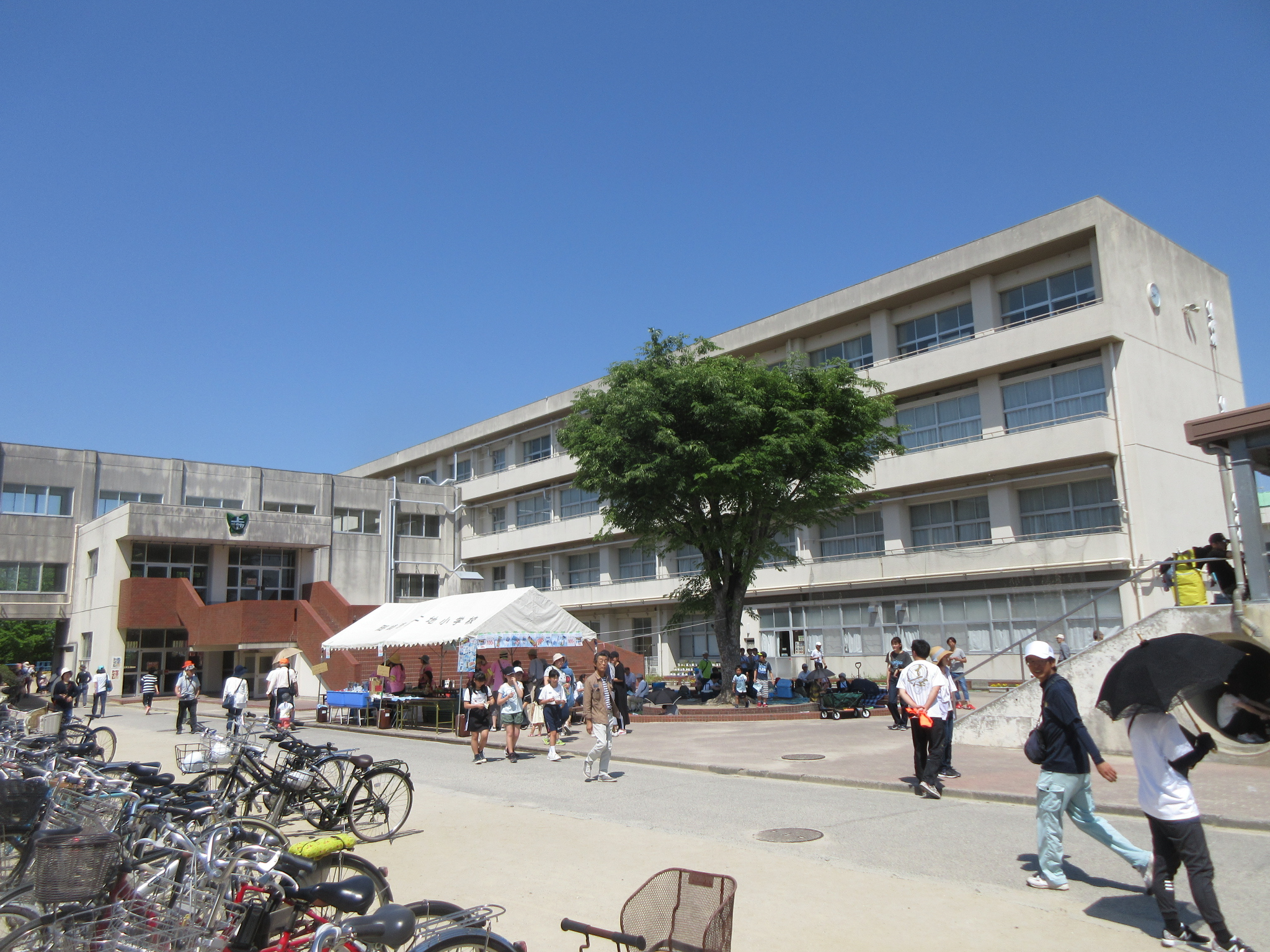 岡崎市立上地小学校（岡崎市上地町）